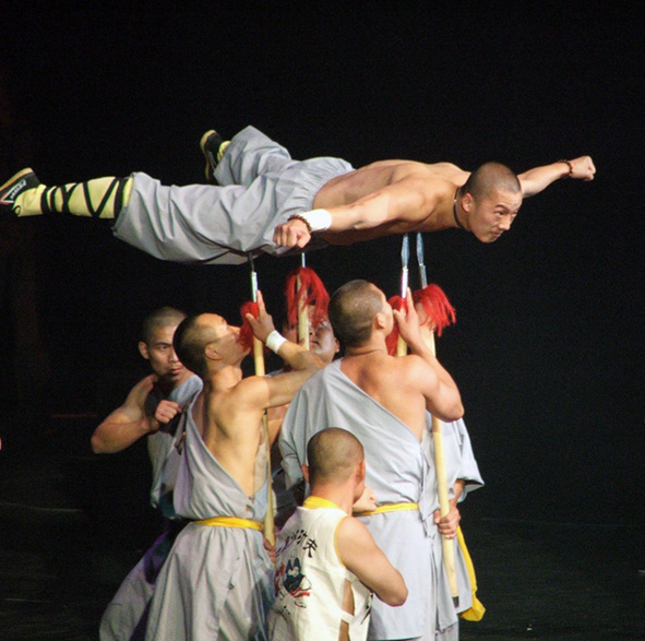 Shaolin quan demonstration